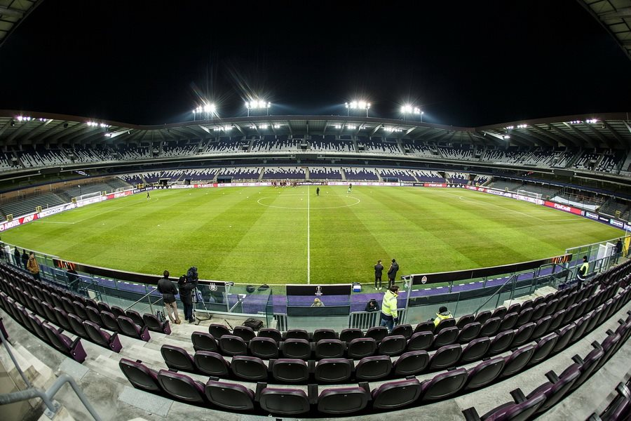 Стадіон "Констант Ванден Сток"